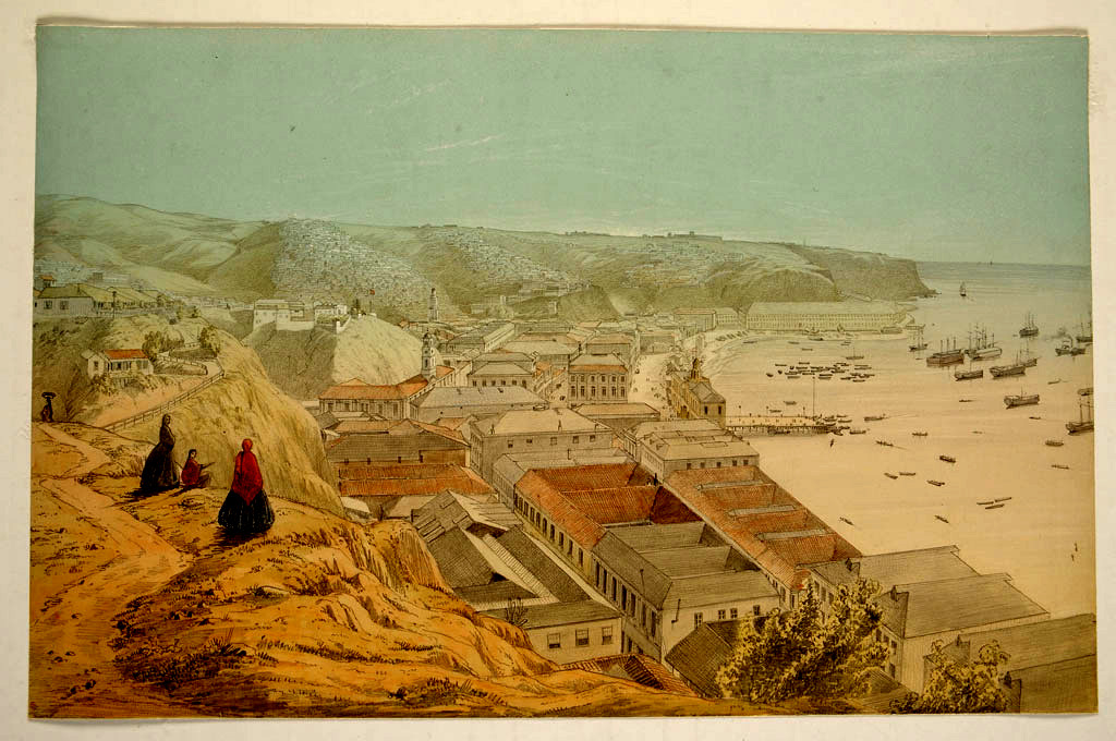 Anónimo. Valparaíso, s/f. Acurela sobre papel. 221x 343 mm. Colección Pinturas y estampas. En depósito. Nº inventario FB- 3456.